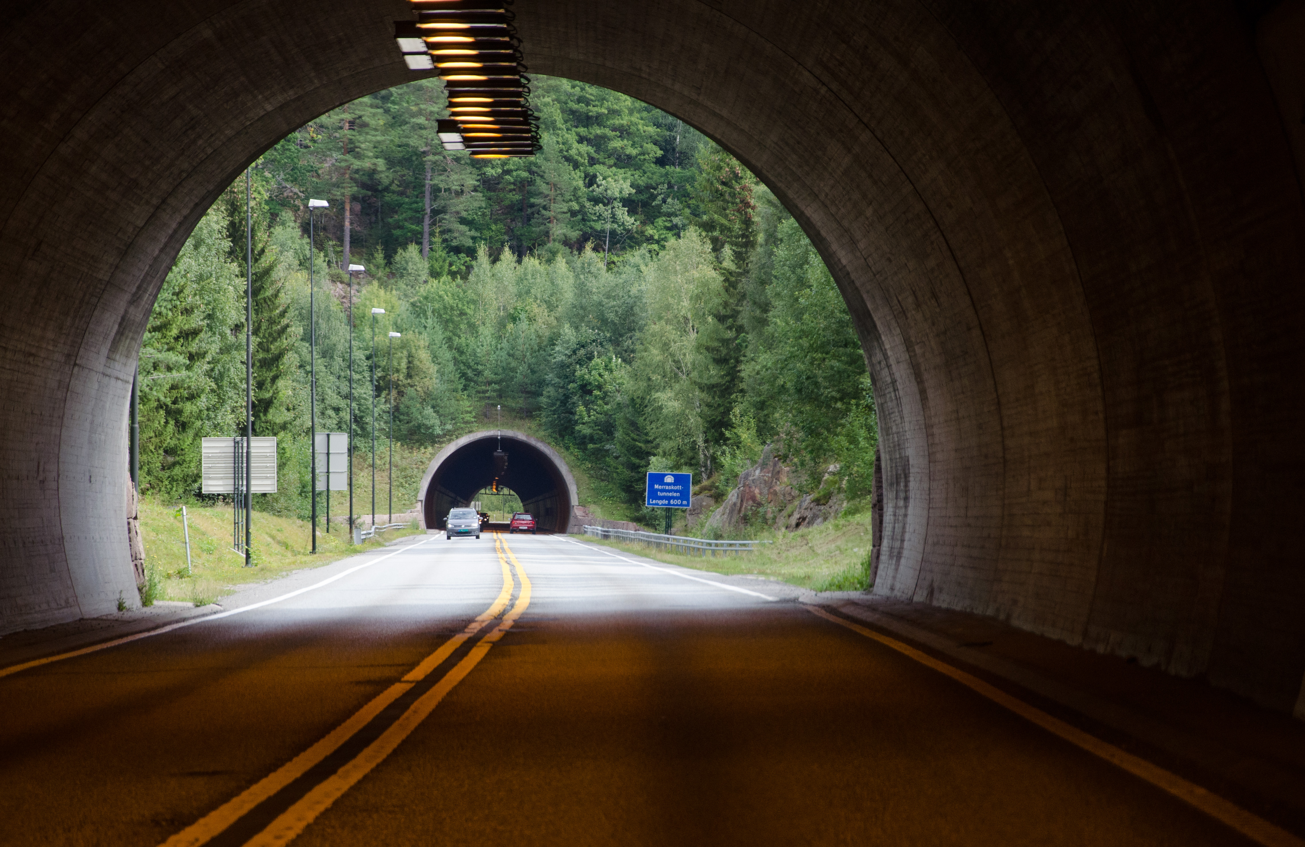 Merraskottunnelen på Rv23